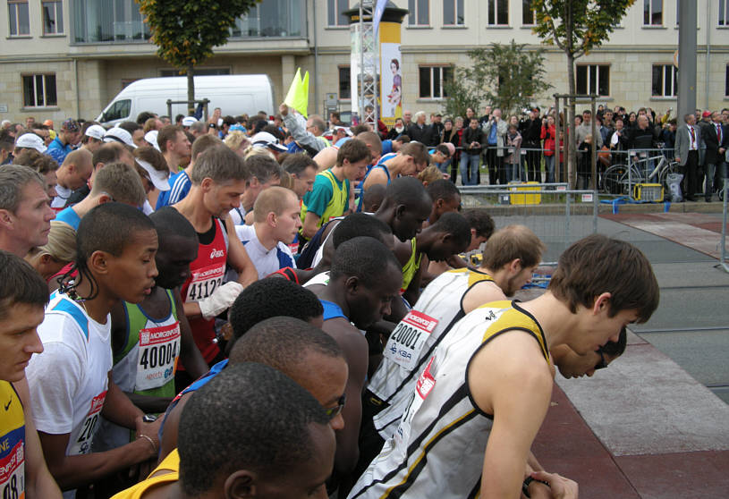 Wenige Sekunden vor dem Startschuss beim Dresden Marathon 2008